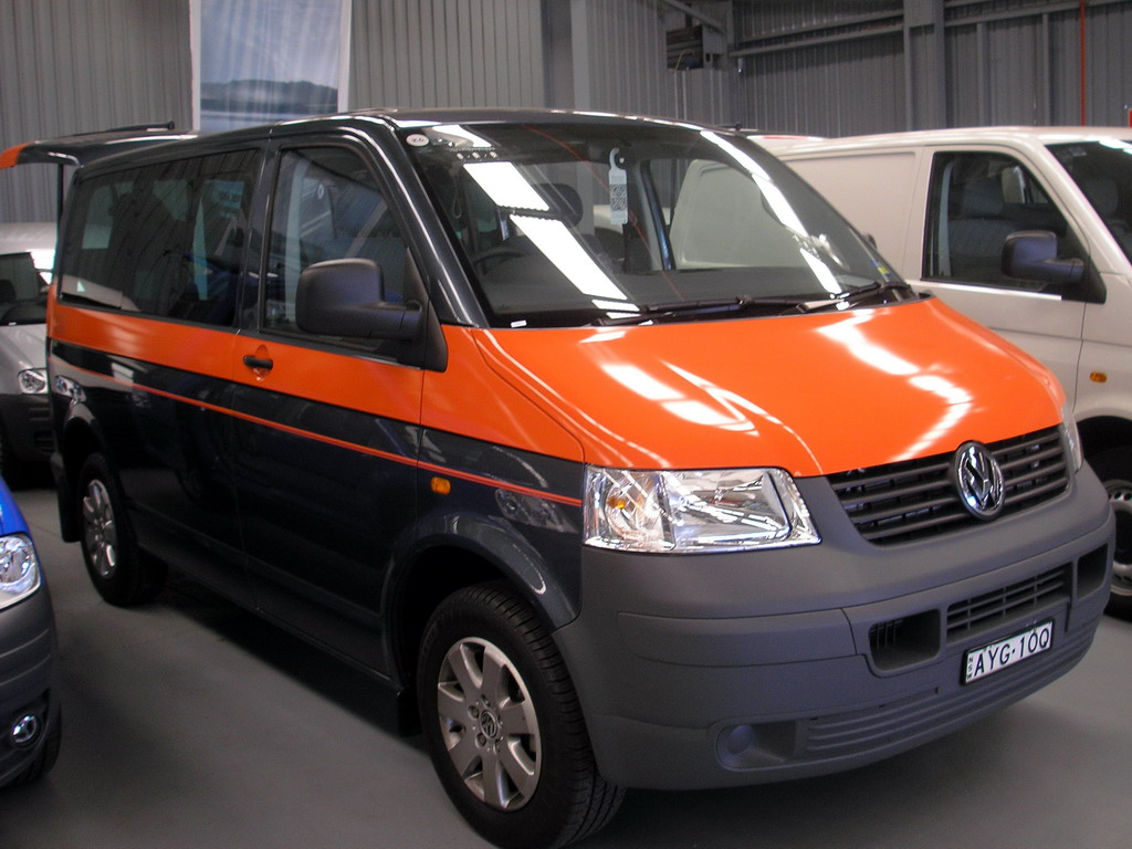 Volkswagen Kombi Beach